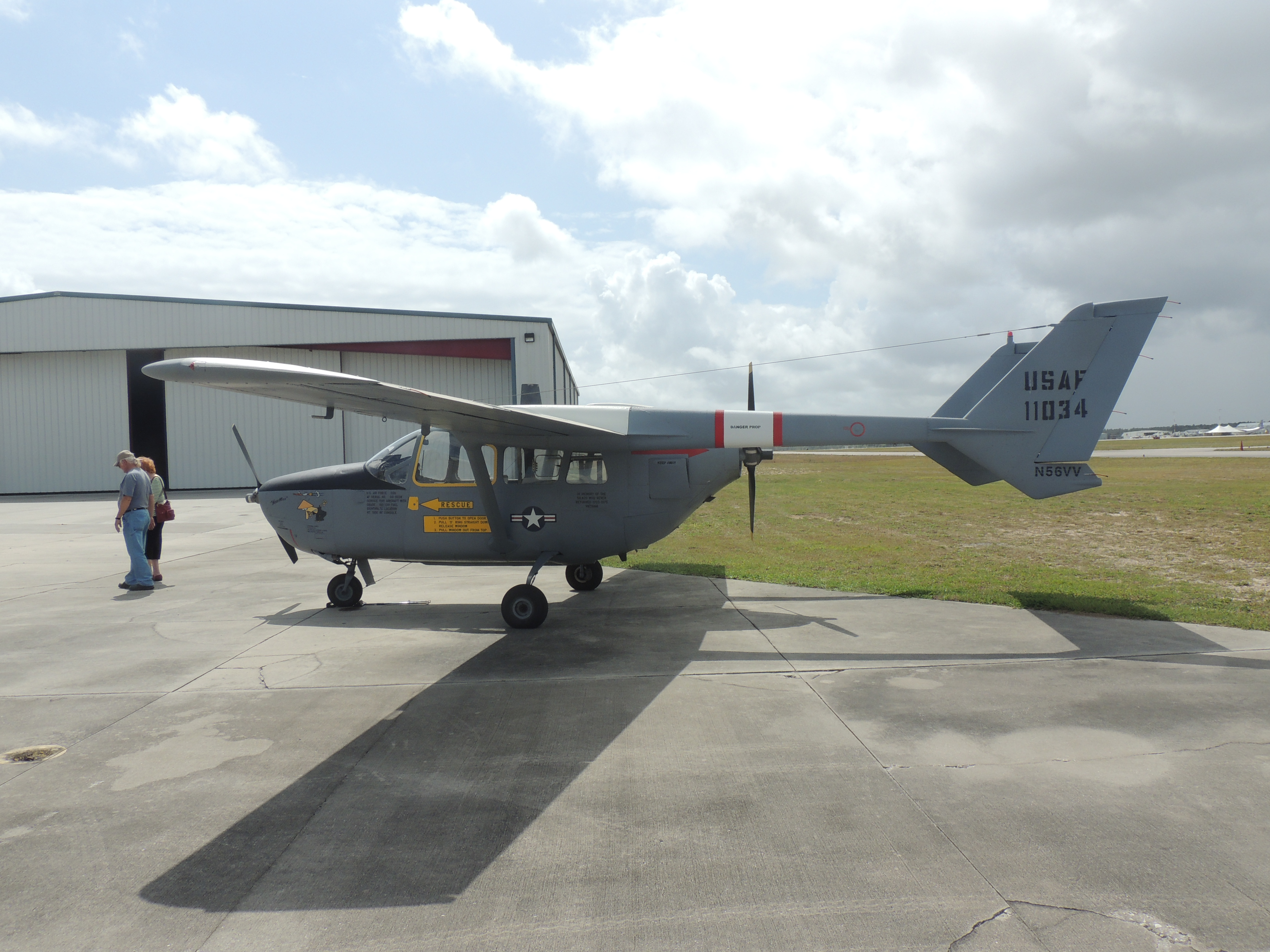 Cessna Skymaster